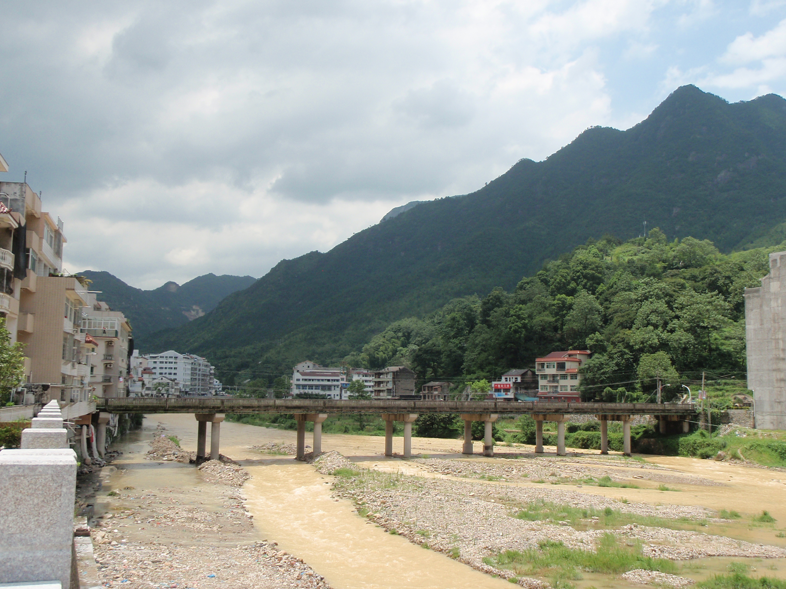 山口的方山溪